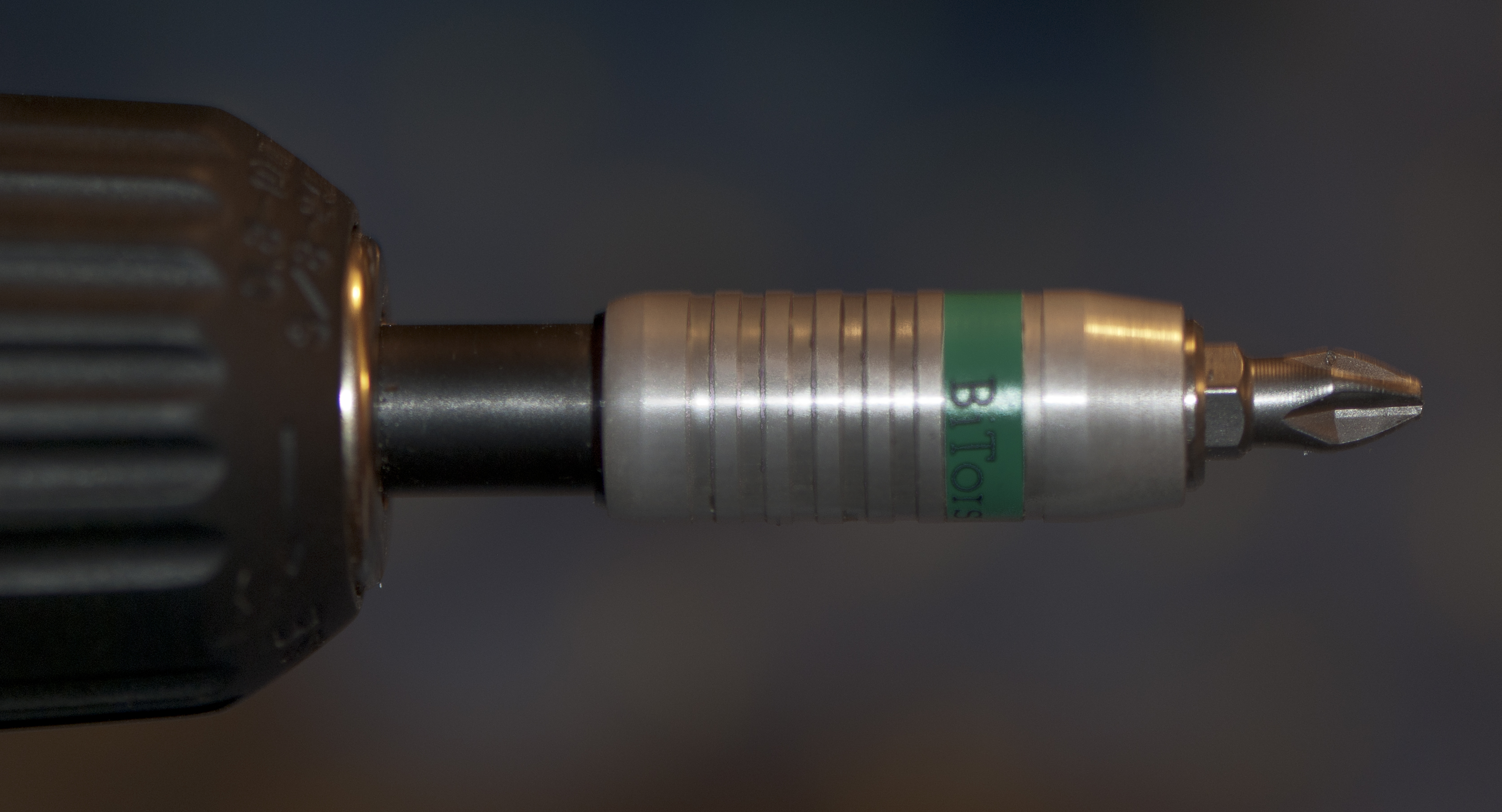 Akkuschrauber mit Bithalterung